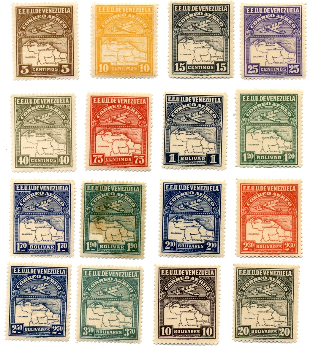 Estampilla de Venezuela 1930 Mapa de Venezuela, Primera Serie